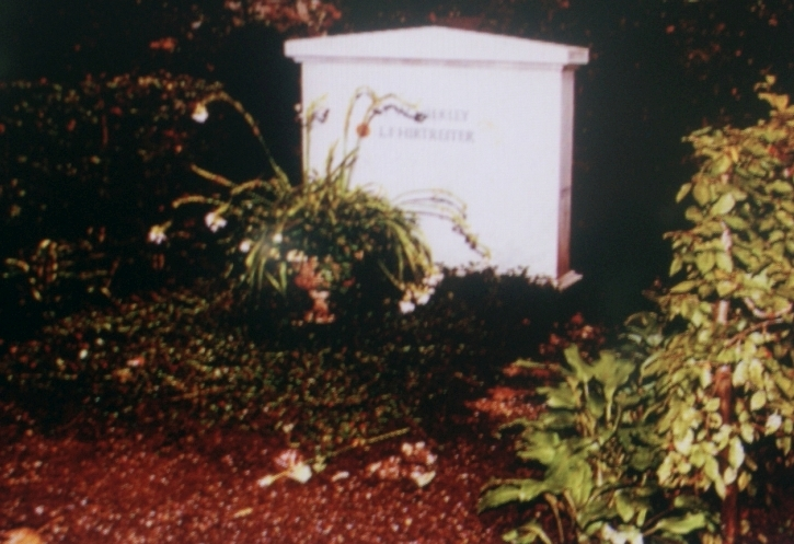 Ostfriedhof München-Rex Gildo